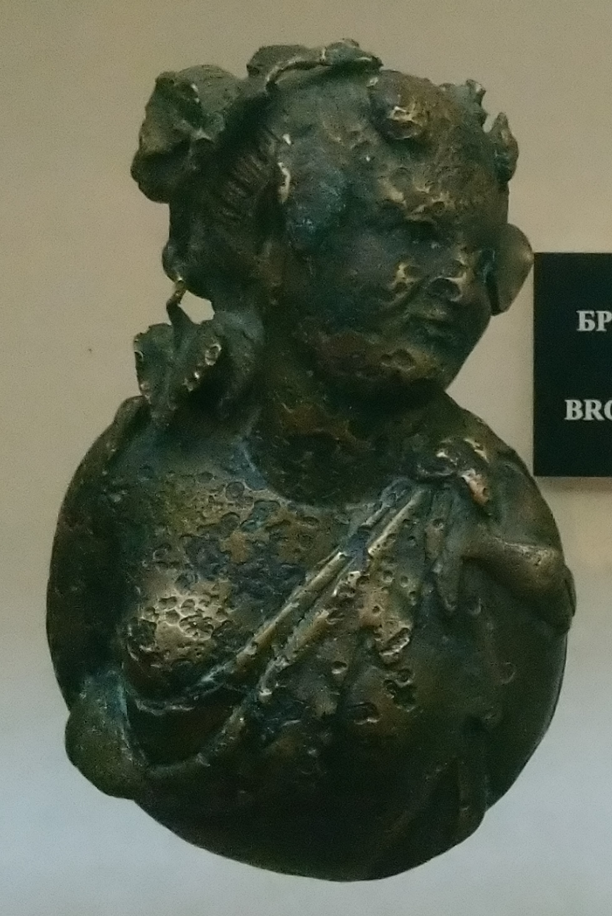 Исторически музей Пазарджик - Бронзова апликация на вакханка - Ивайло